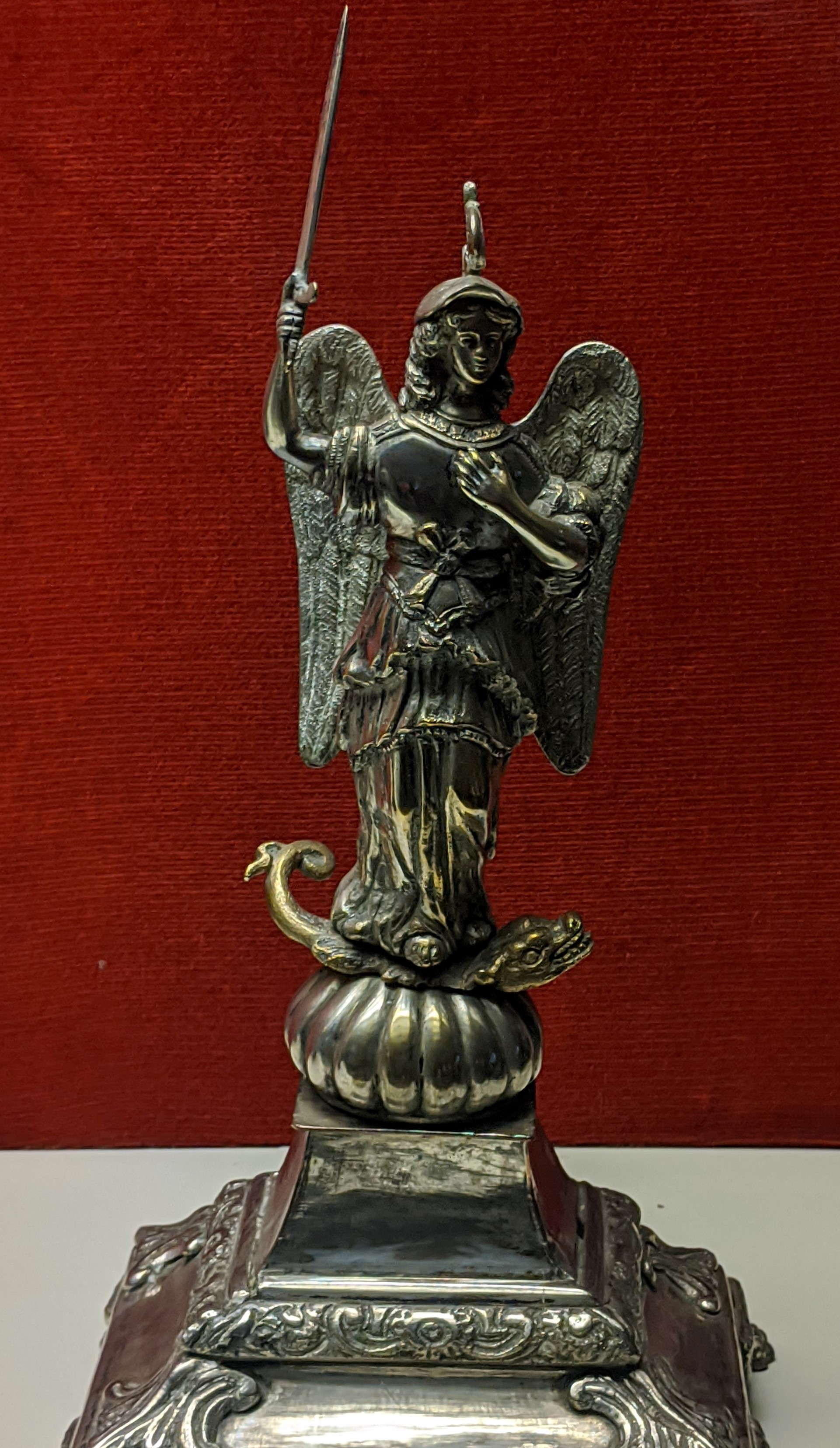 Neoklasikoa, XIX. mendekoa.Alpaka